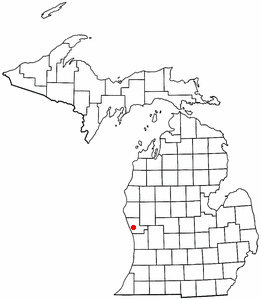 Muskegon, Michigan.